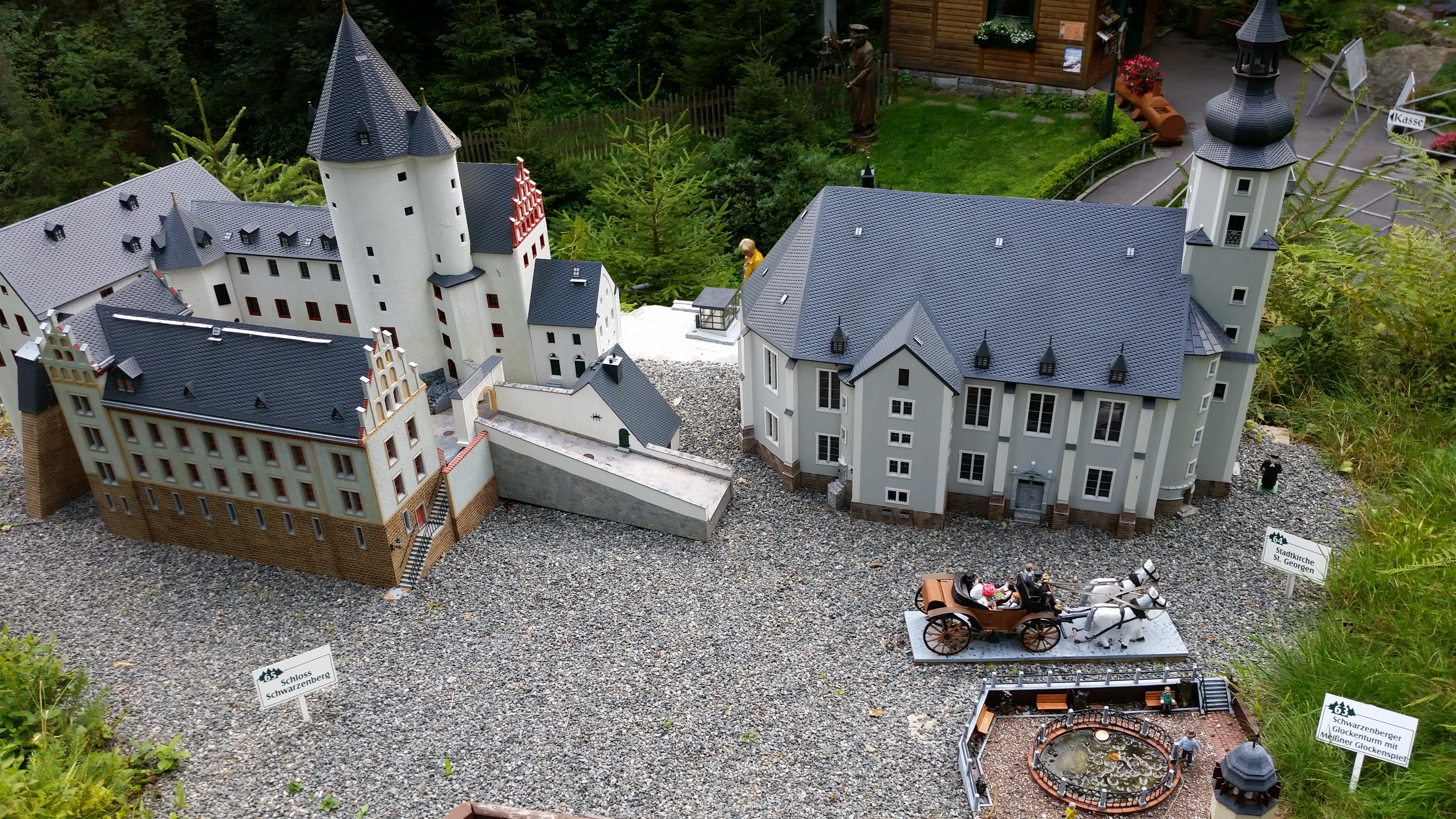 Modelle von Schloss Schwarzenberg und Stadtkirche "St. Georgen" im Miniaturenpark "Heimatecke Waschleithe".